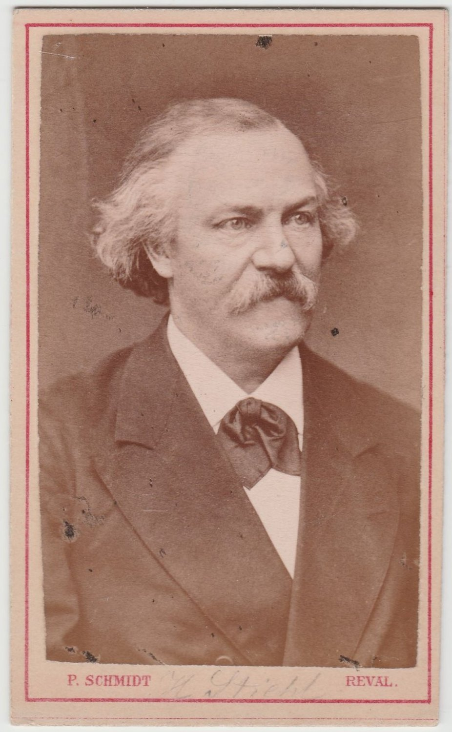 Porträtfoto von Heinrich Stiehl, Atelier P. Schmidt, Reval